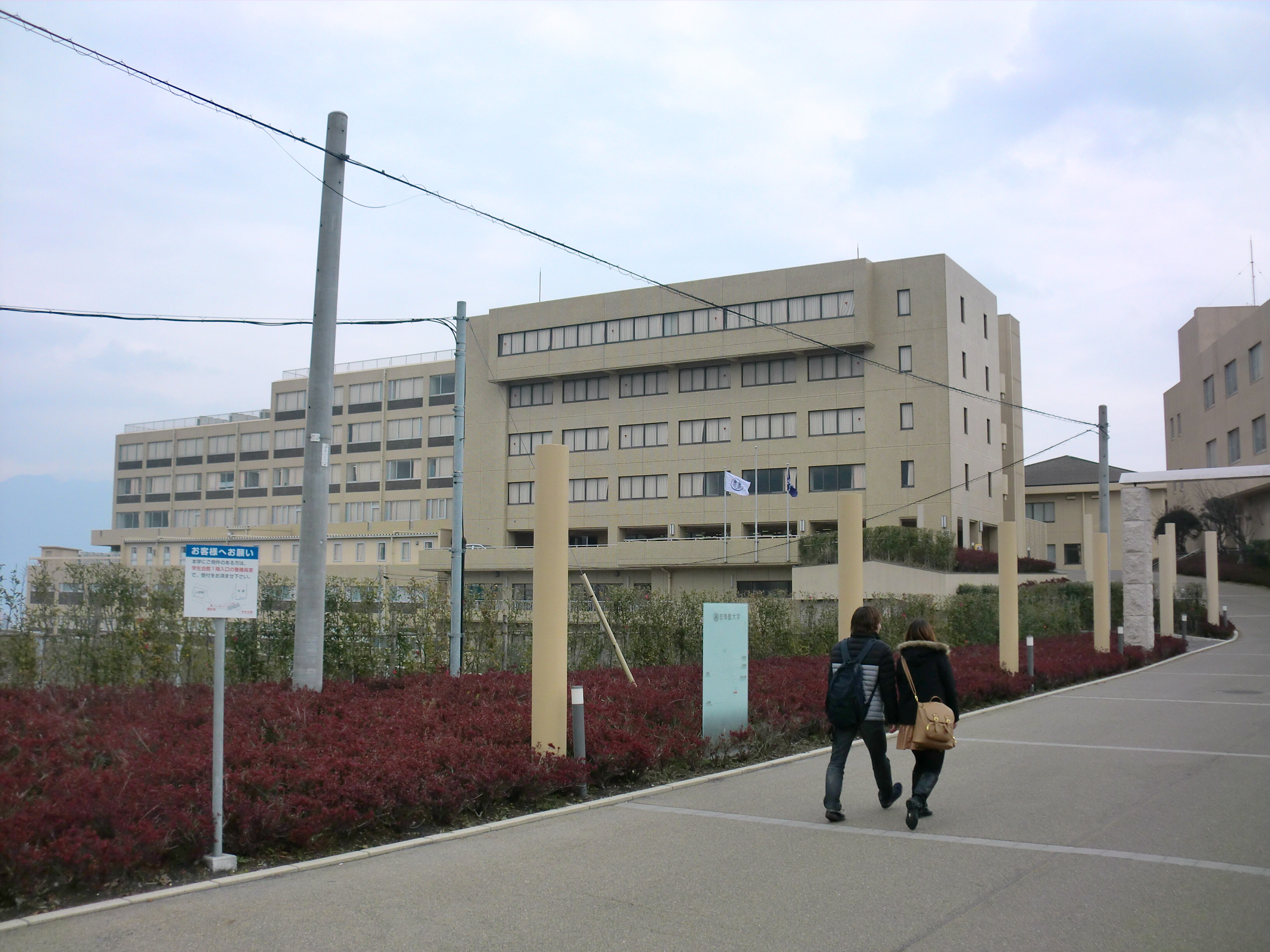 鹿児島市にある志学館大学